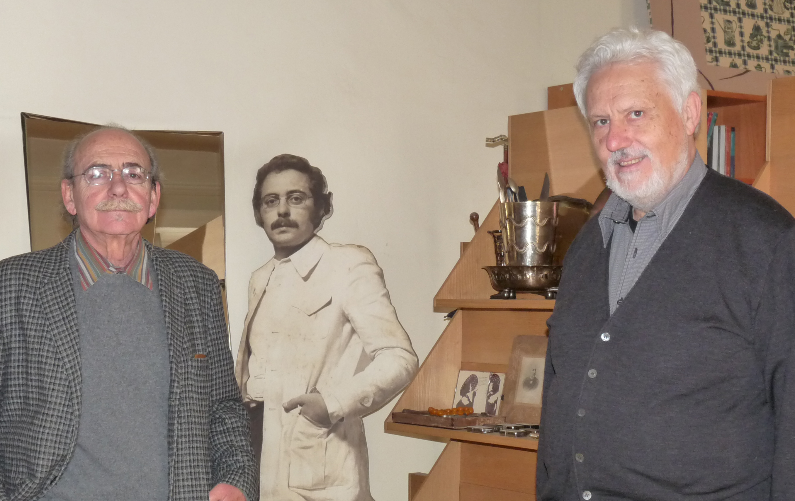 Con Ugo La Pietra nel suo studio a Milano, 2011